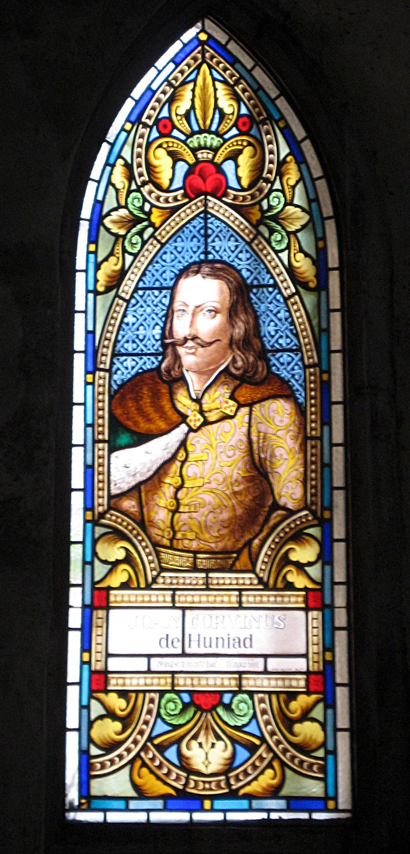 Hrad Hunedoara